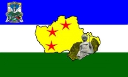 Bandera del Municipio Juan German Roscio